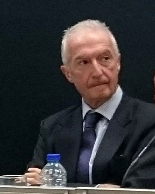 Gilles de Kerchove lors d'une conférence donnée au Collège d'Europe à Bruges.